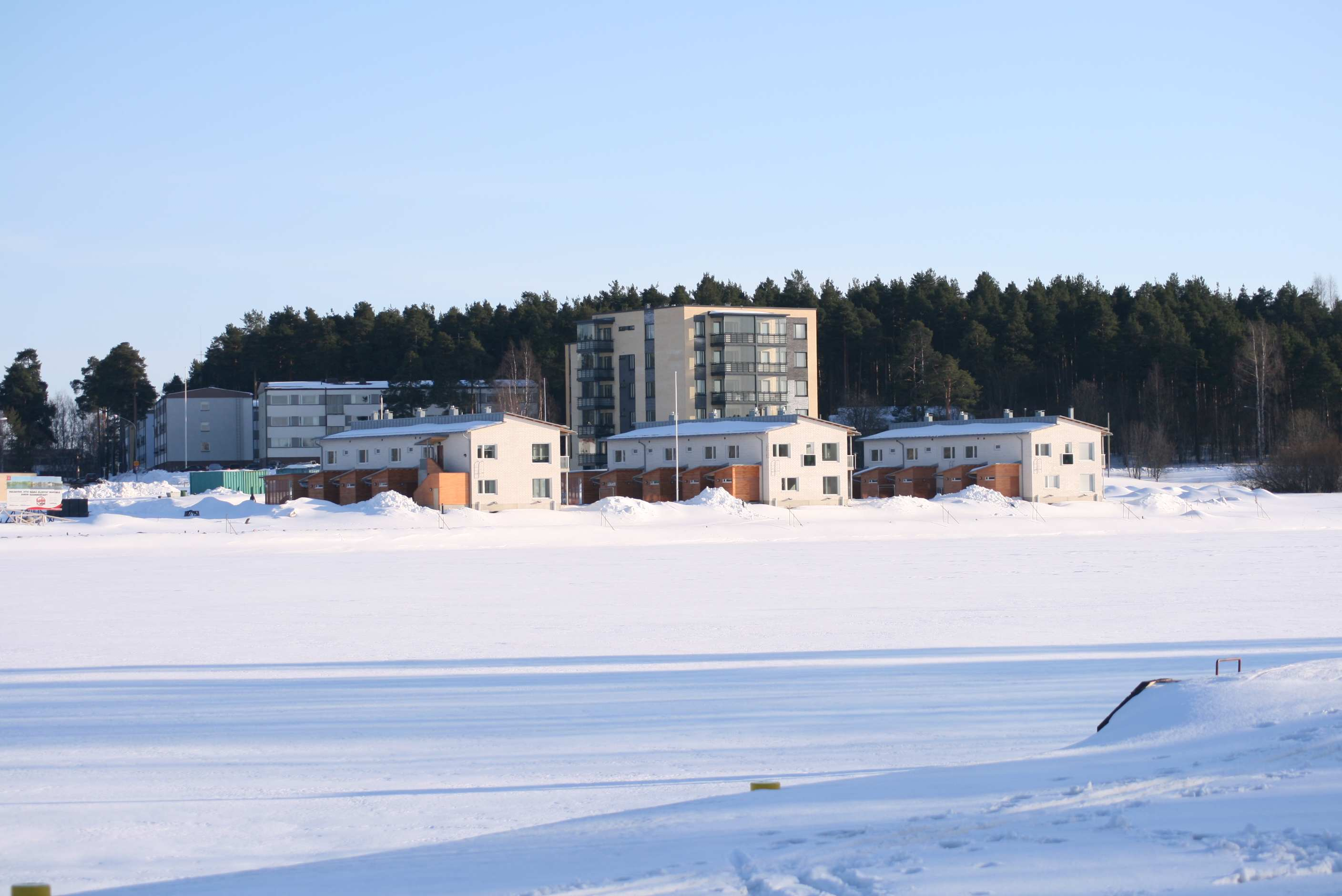 Penttilä over Pielisjoki in Joensuu